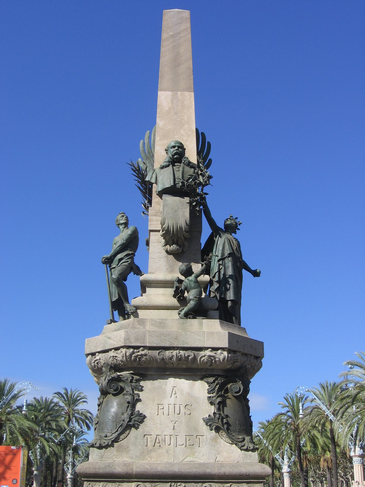 A Francesc Rius i Taulet, de Manel Fuxà.